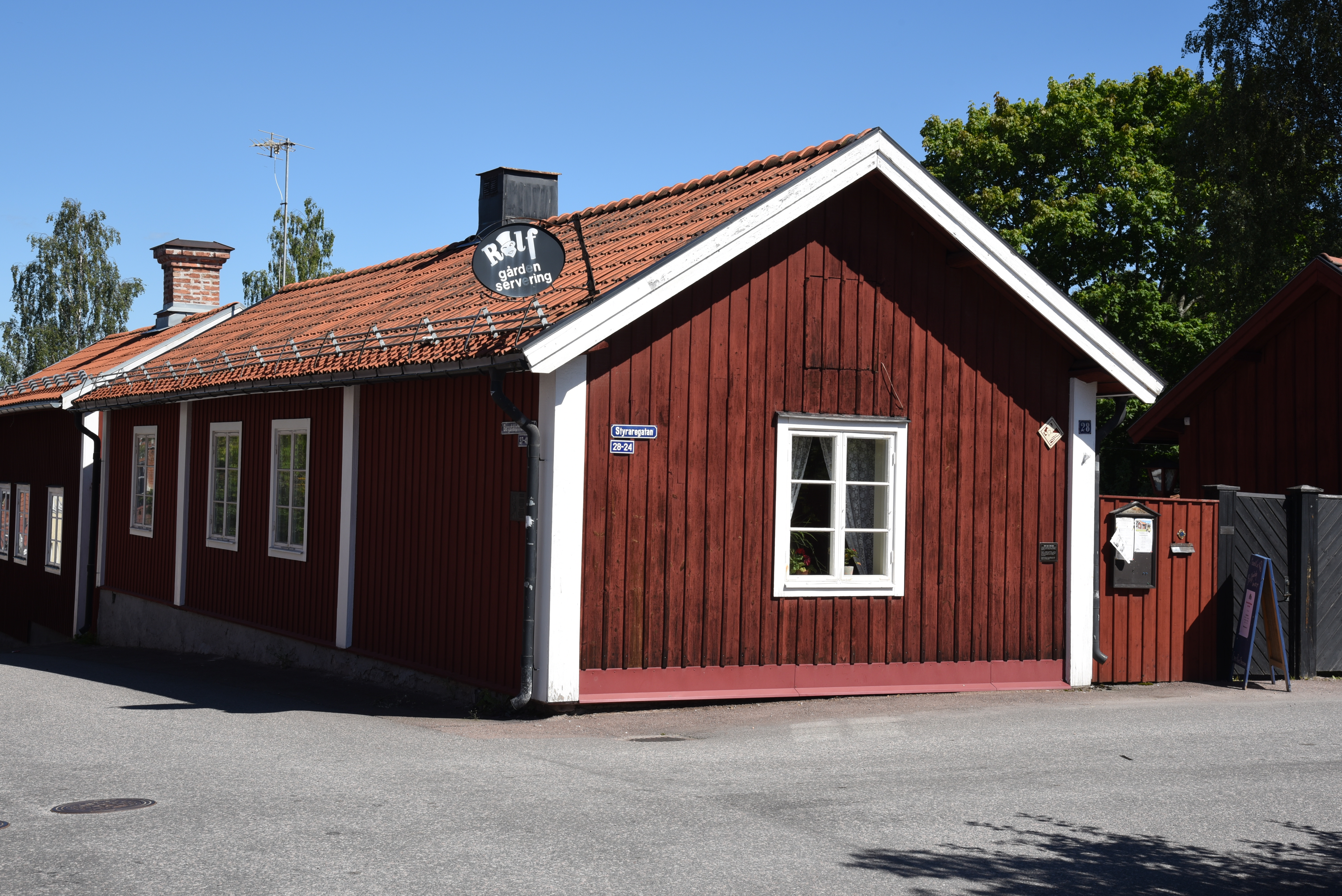 Ernst Rolf-gården vid Styraregatan 28 i stadsdelen Elsborg i Falun. Byggnaden är revyartisten Ernst Rolfs födelsehem.